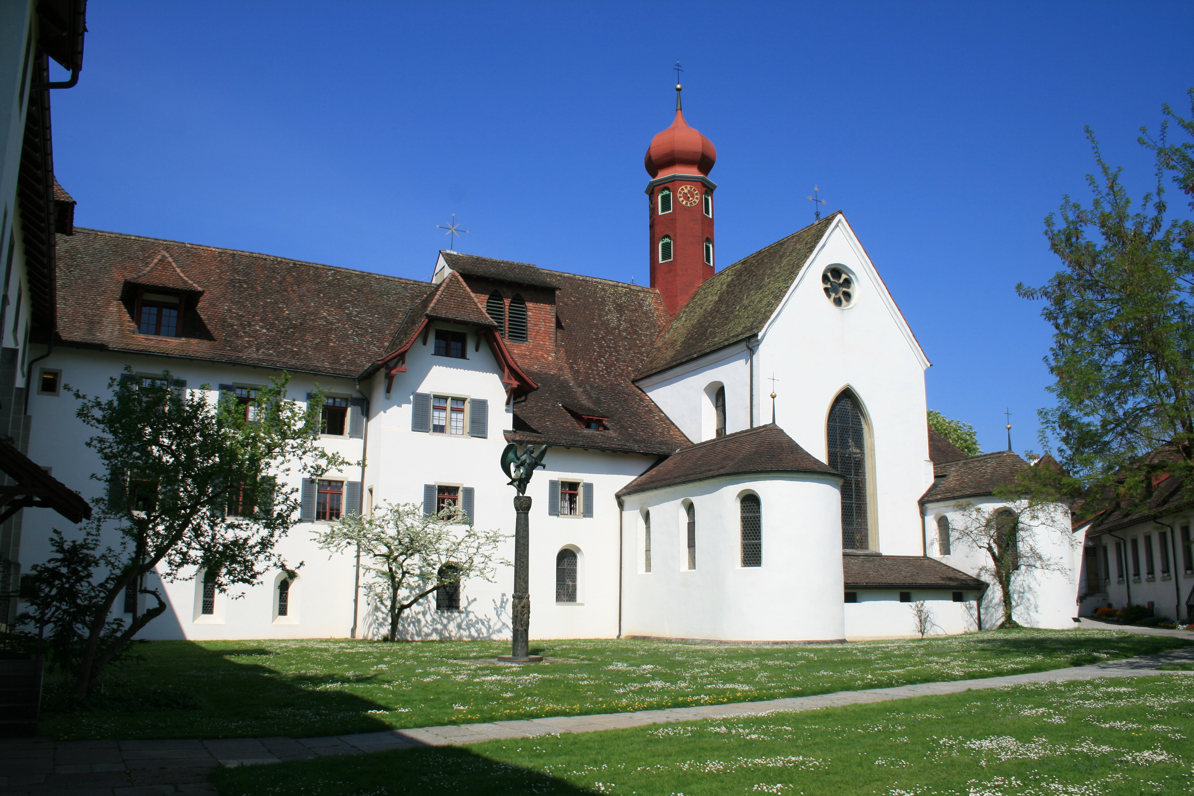 Klosterkirche Wettingen, Schweiz